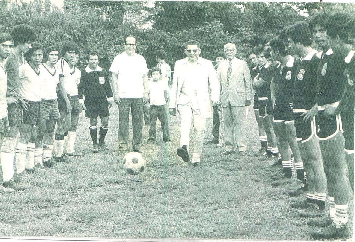 Universidade catolica